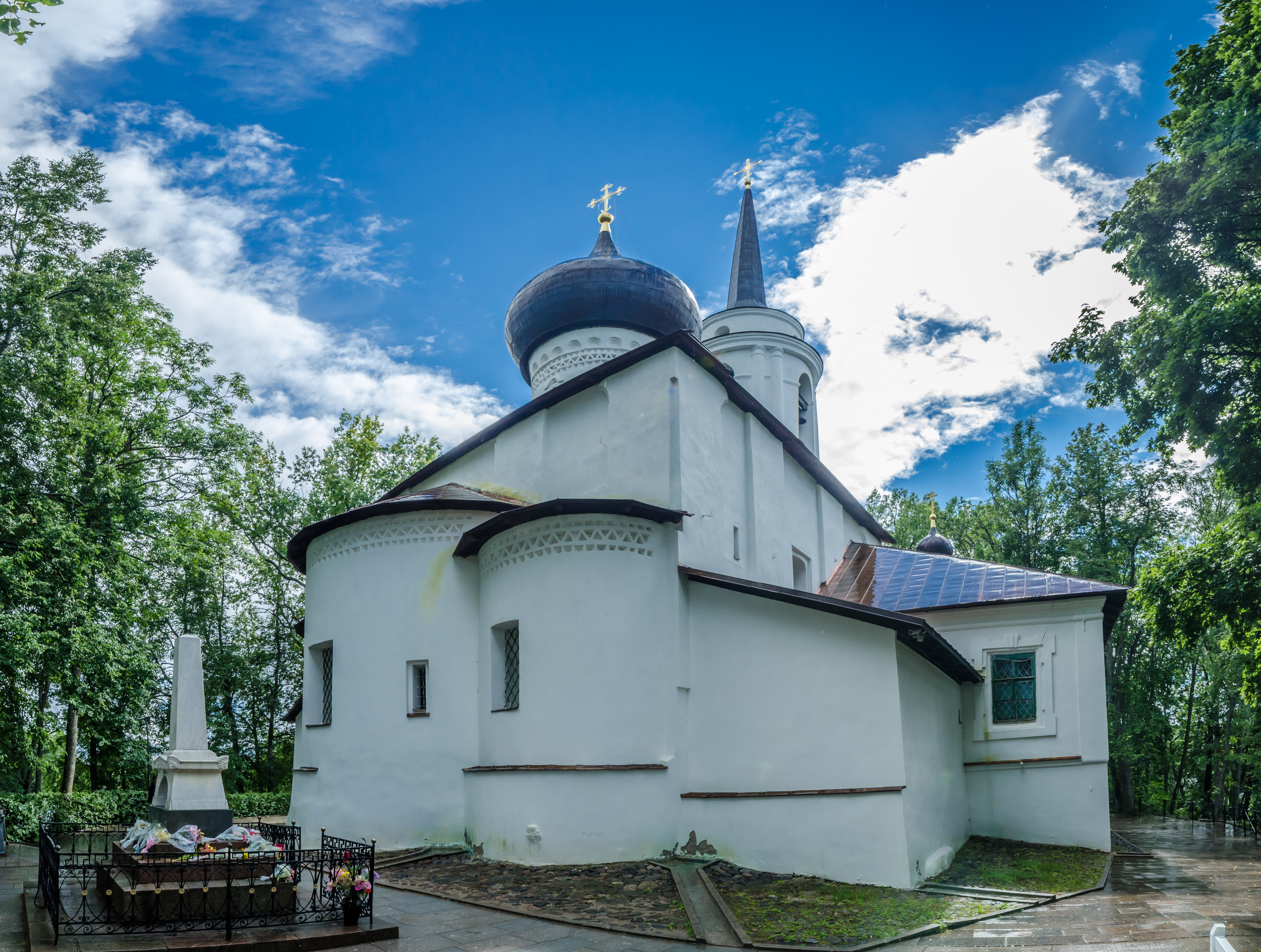 собор Успенский: Пушкинские Горы, Пушкиногорский район, Псковская область